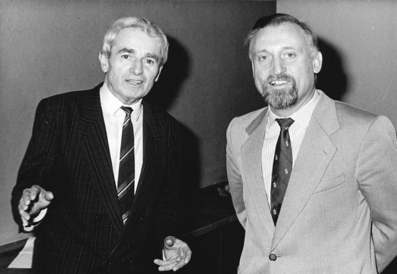 ADN- Thomas Lehmann-24.10.90-Magdeburg: Die Koalitionsgespräche zur Regierungsbildung in Sachsen-Anhalt laufen. Verhandlungsführer sind Dr. Gerd Gies (r.) - CDU- und Prof. Gerd Brunner (FDP).